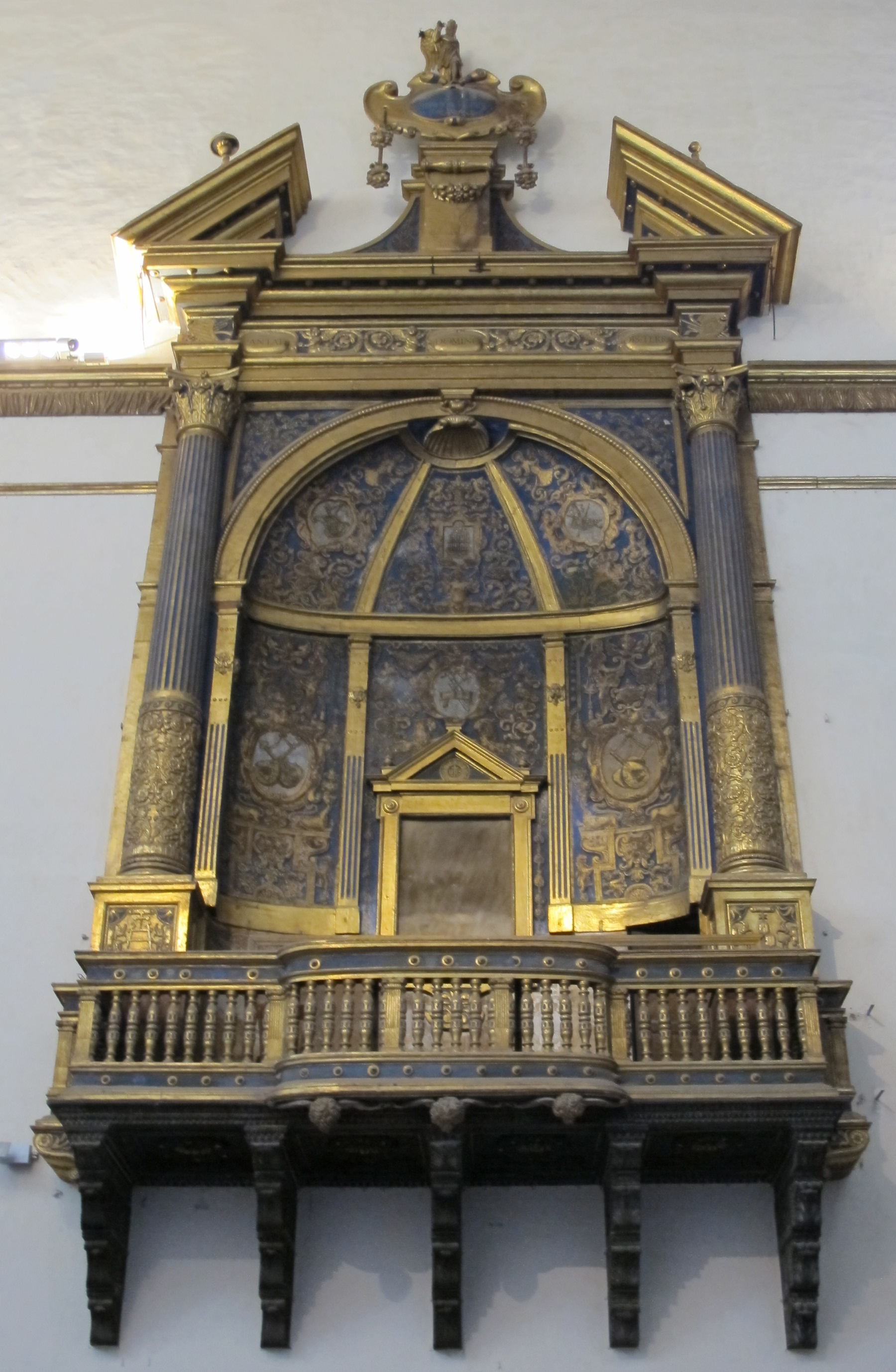 Santissima Annunziata (Siena) 07 cantoria